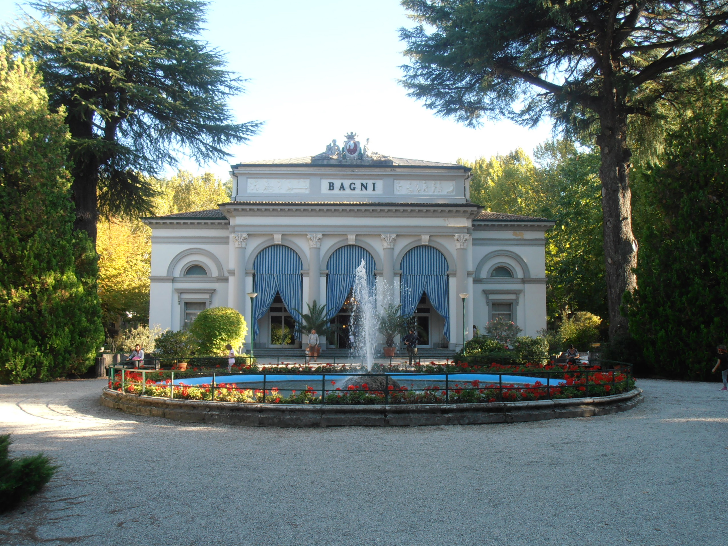 Italy - Riolo Terme - Parco delle terme